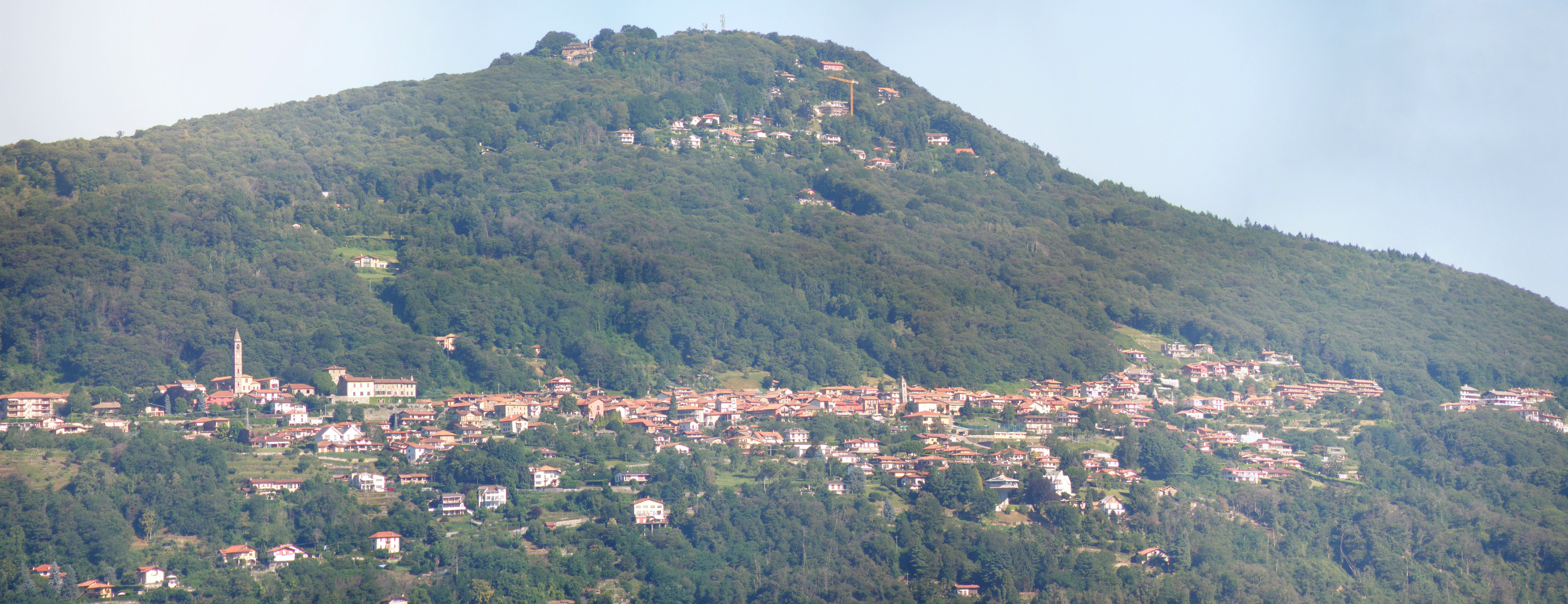 Massino Visconti (NO). Panorama da Ranco, sulla riva opposta del Lago Maggiore.